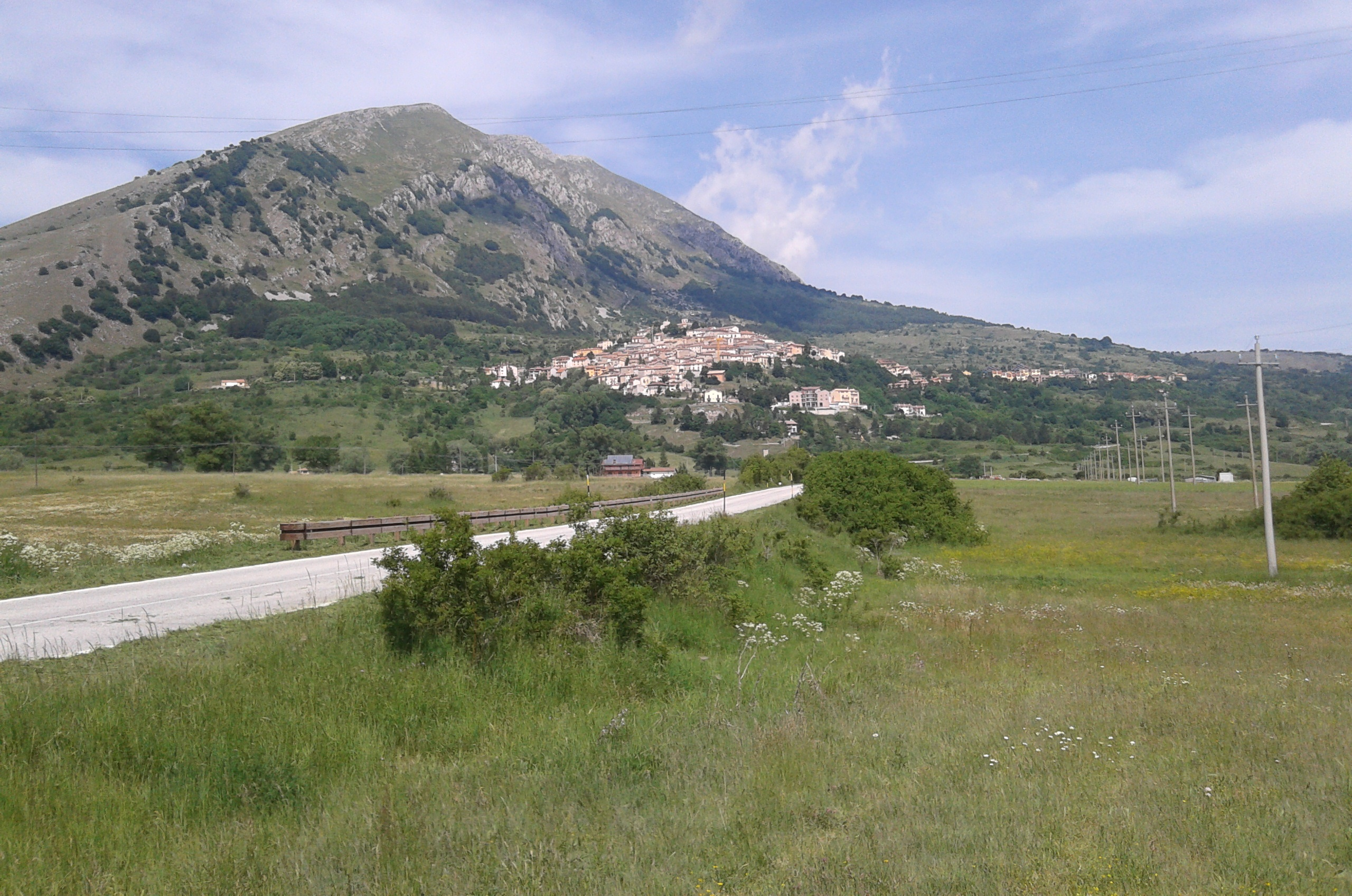 Foto panoramica di Rocca di Cambio